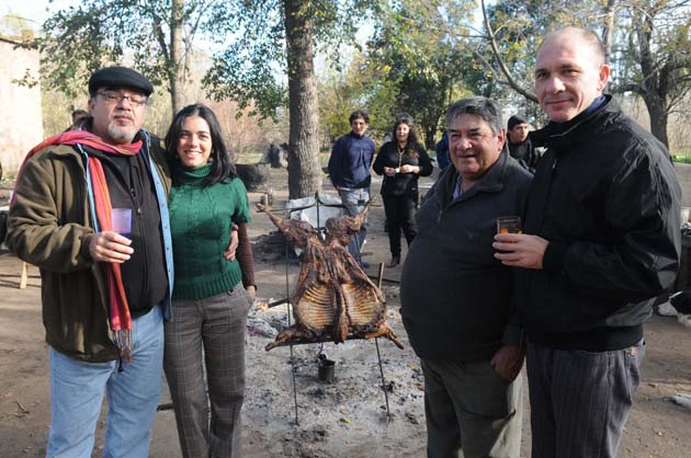 Miguel Mato, director de la película, y sus protagonistas, en la estancia El Puma. Entre otros, Darío Grandinetti.